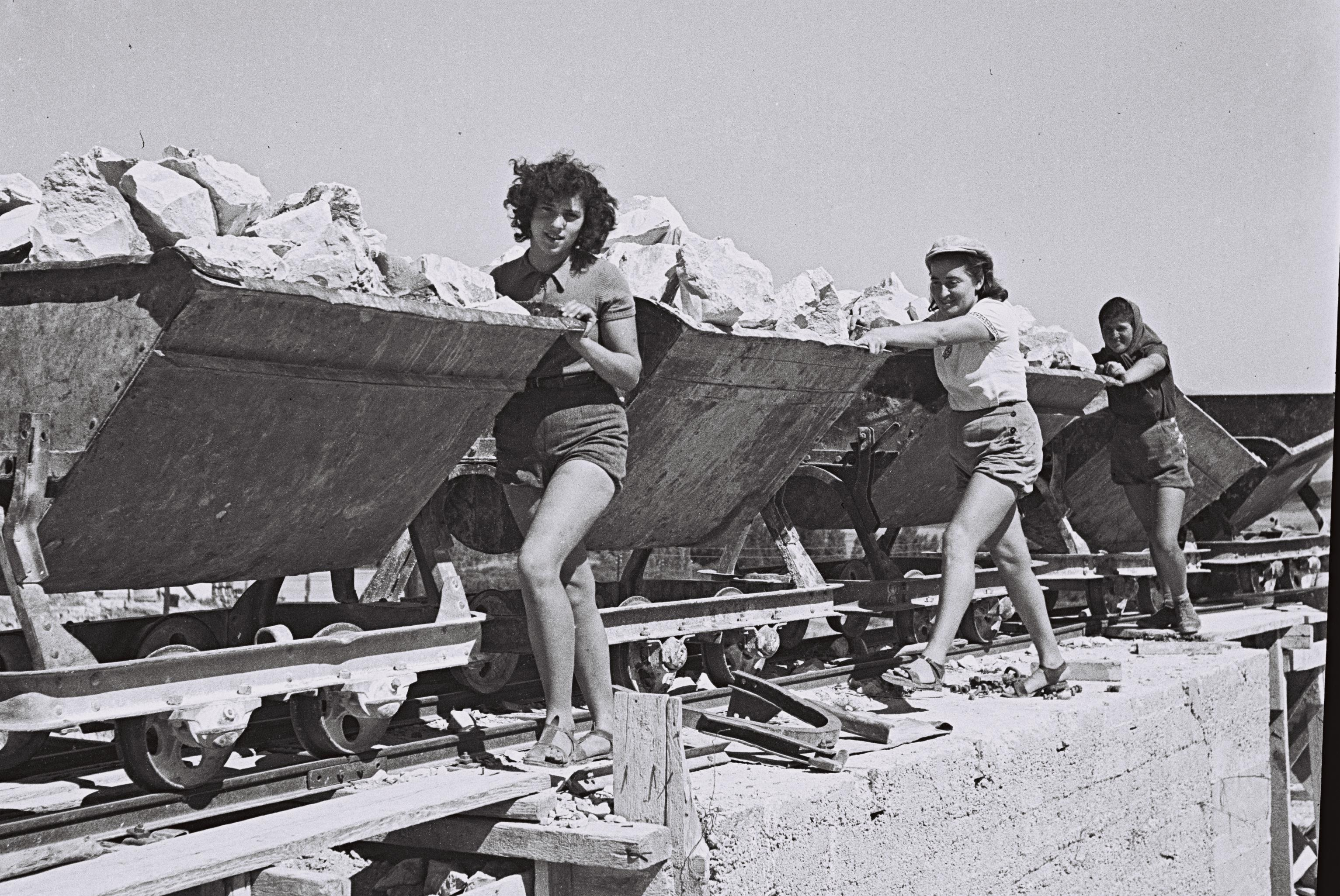 Kibbutz members working at the stone quarry of kibbutz Ein-Harod (1941). Photo: GPO. חברות קיבוץ עין חרוד עובדות במחצבת הקיבוץ (1941). צילום: לעמ.